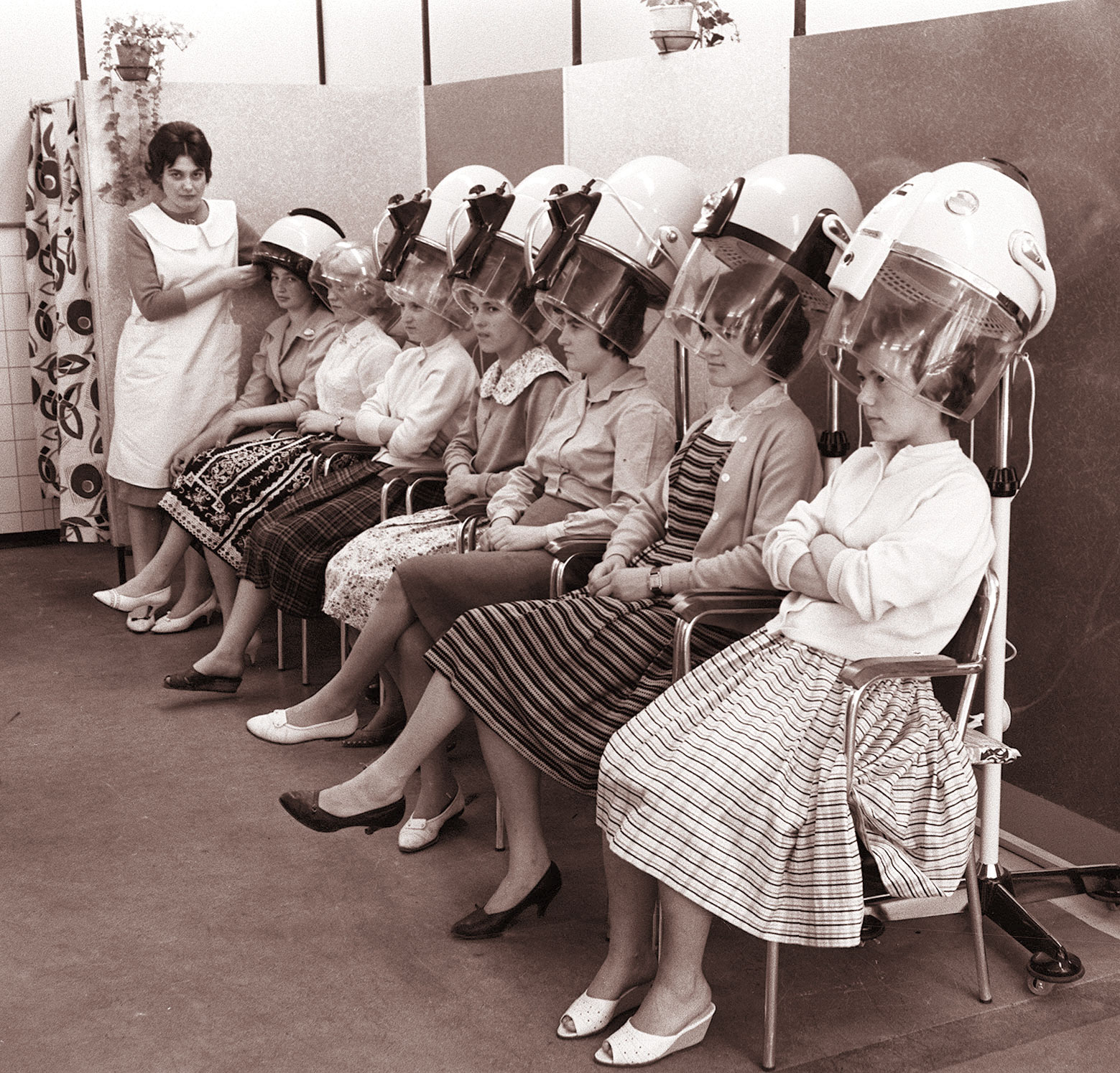 Prenovljeni frizerski salon v Gosposki ulici v Mariboru.